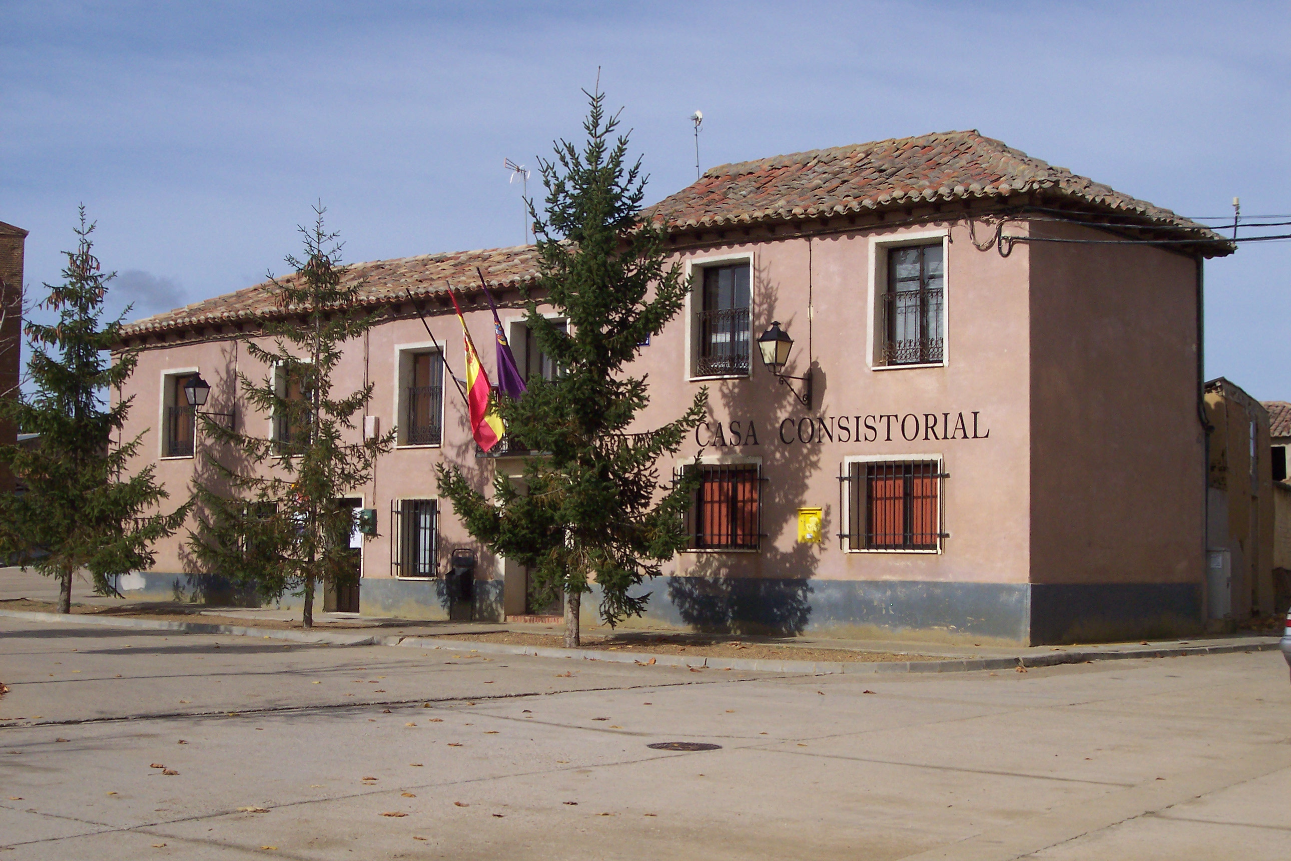 Casa consistorial de San Román de la Cuba (Palencia, España).